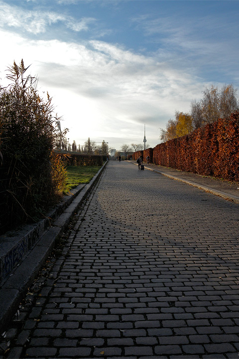 Pflasterstrasse im Mauerpark